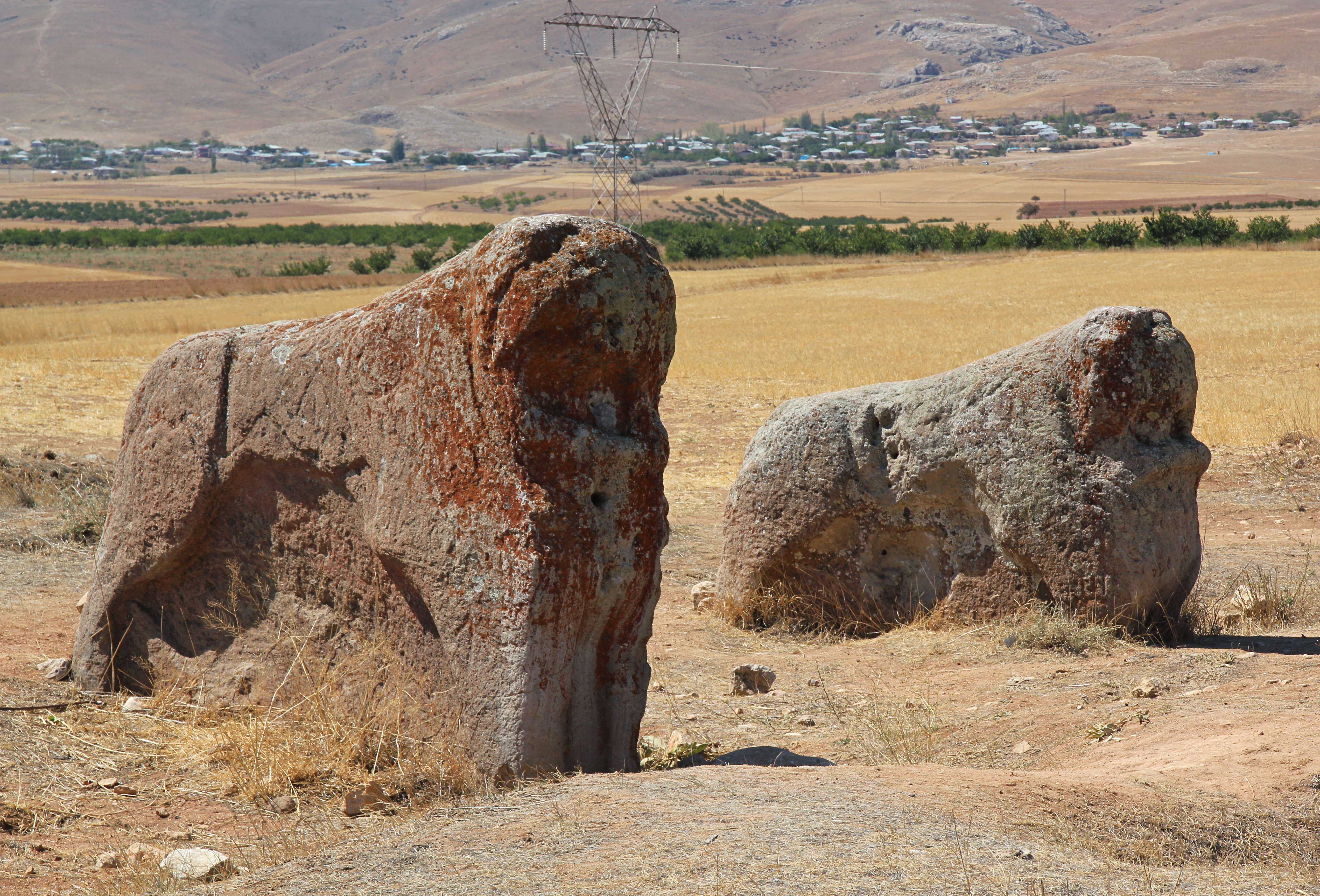 Arslantaş, späthethitische Löwenskulpturen nahe Darende in der türkischen Provinz Malatya